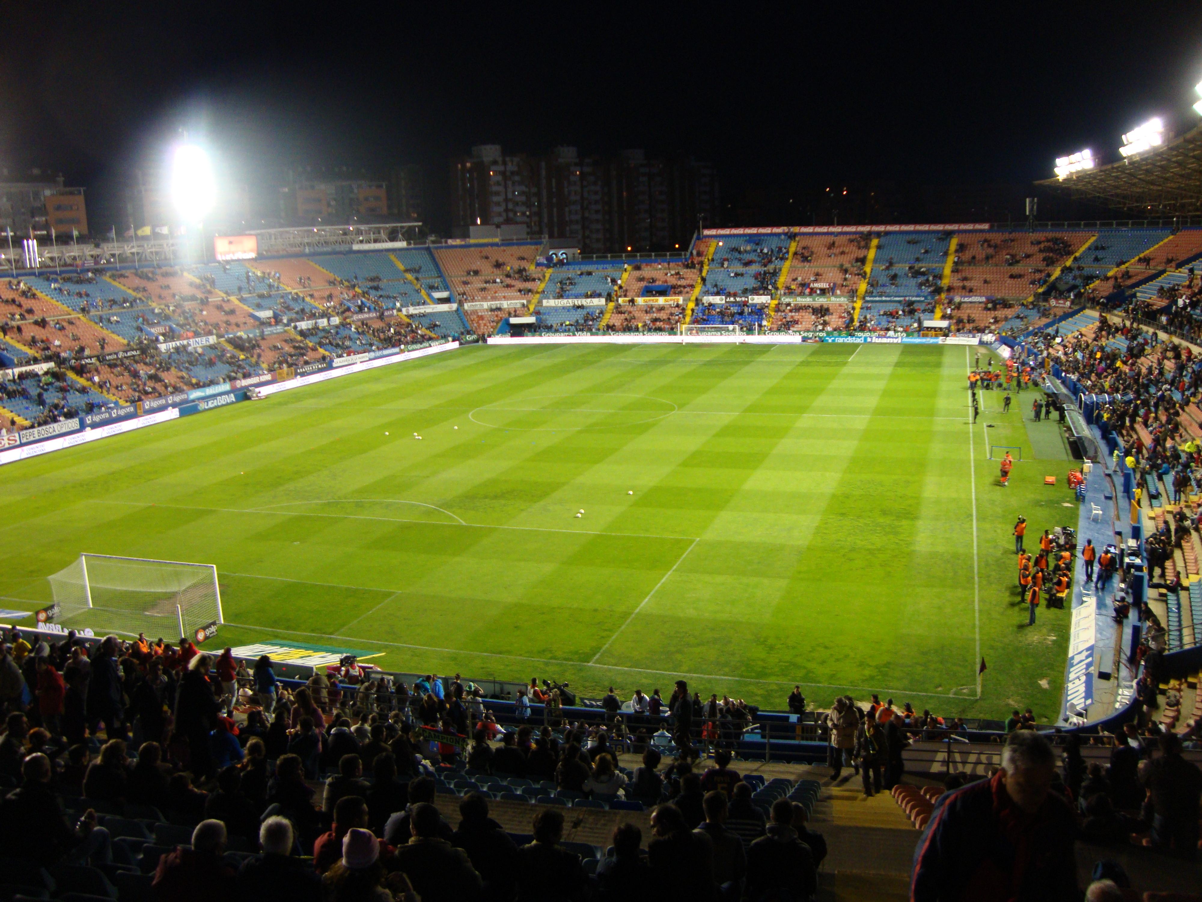 Het stadion van Levante, voorafgaand aan de wedstrijd Levante - FC Barcelona